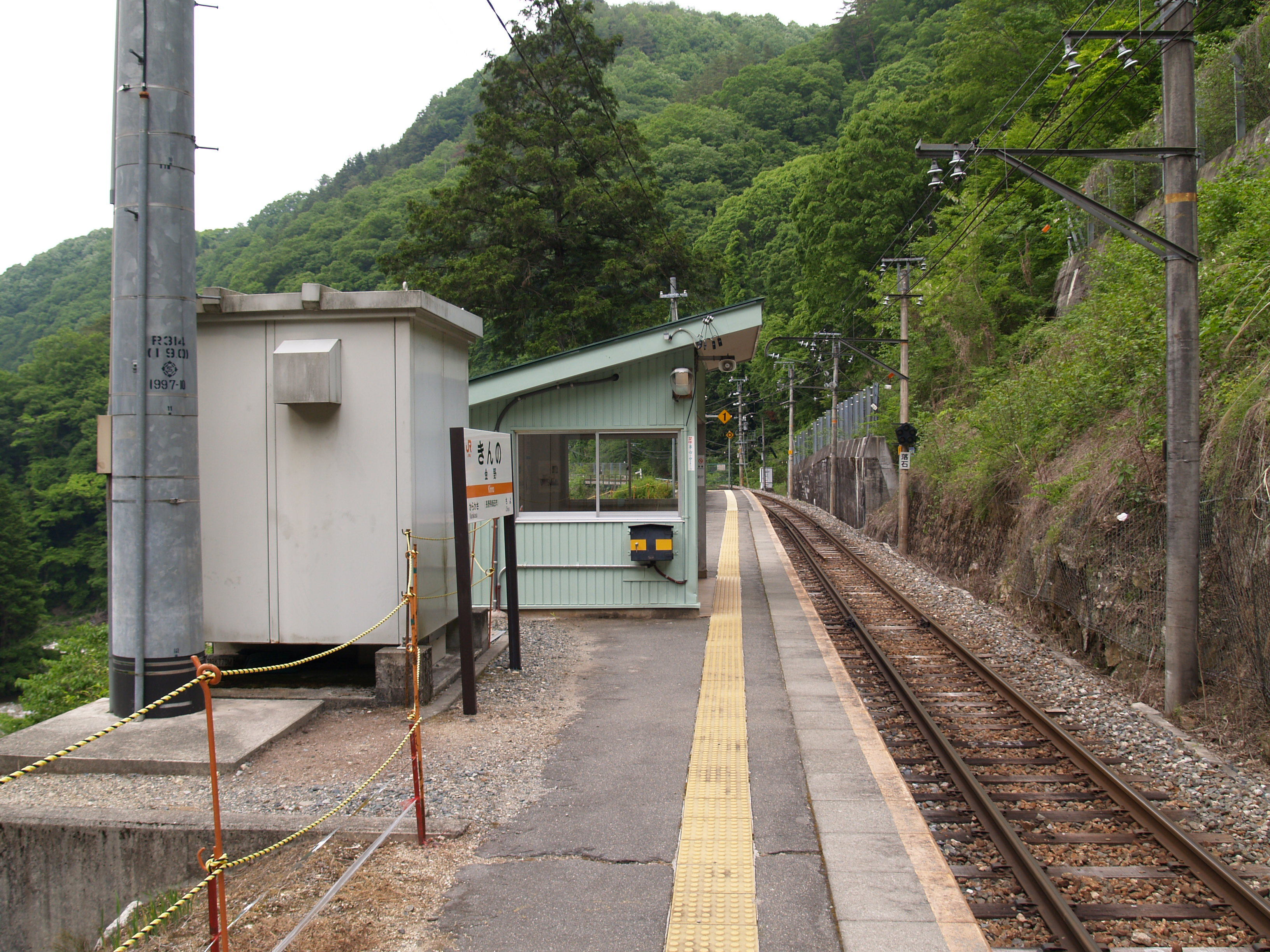 金野駅ホーム